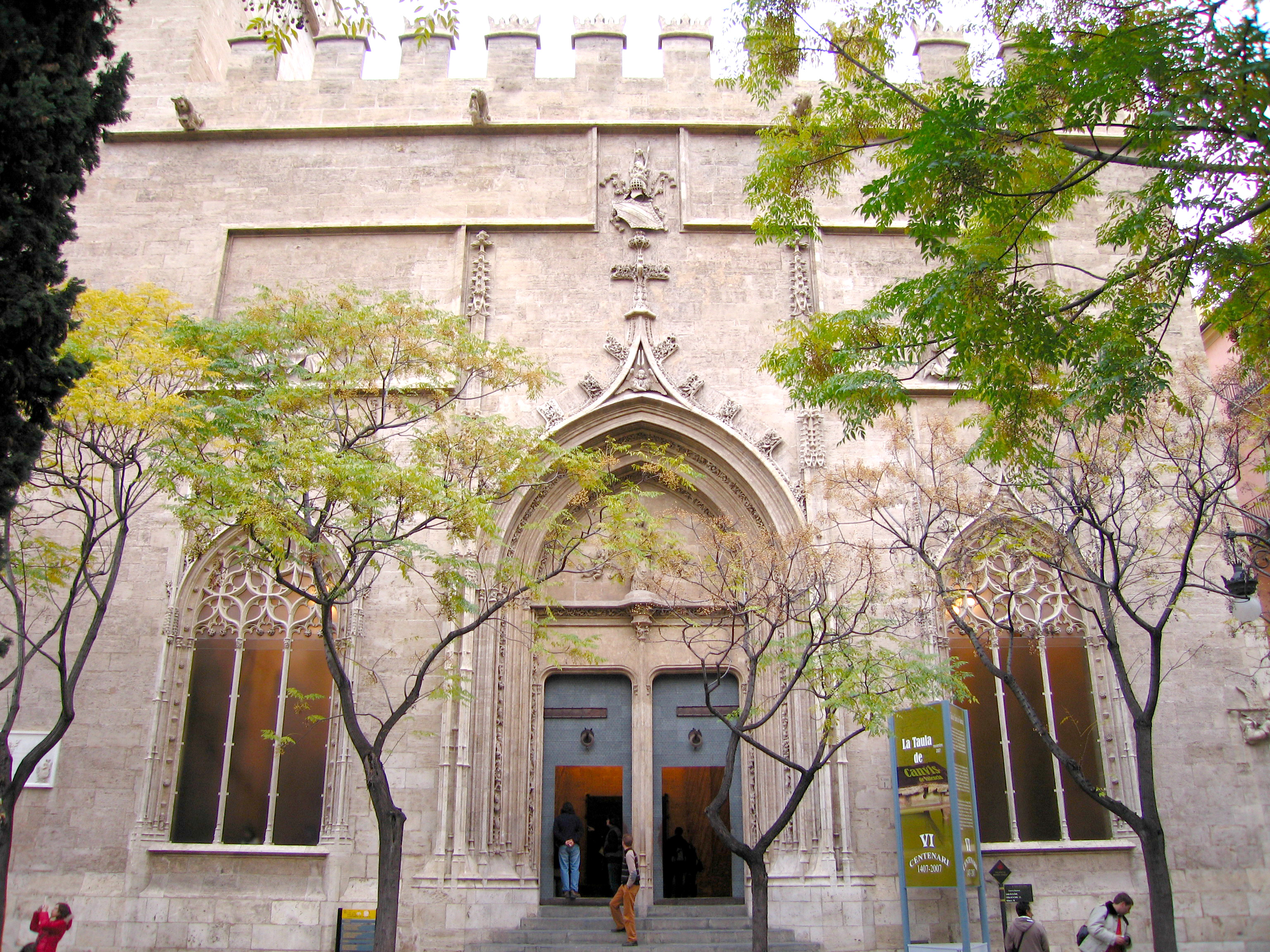 Façana i Entrada al Saló Columnari de la Llotja de la seda, València. Façade and Entrance into the Hall of Columns in the Silk Exchange (Llotja de la Seda), Valencia, Spain.